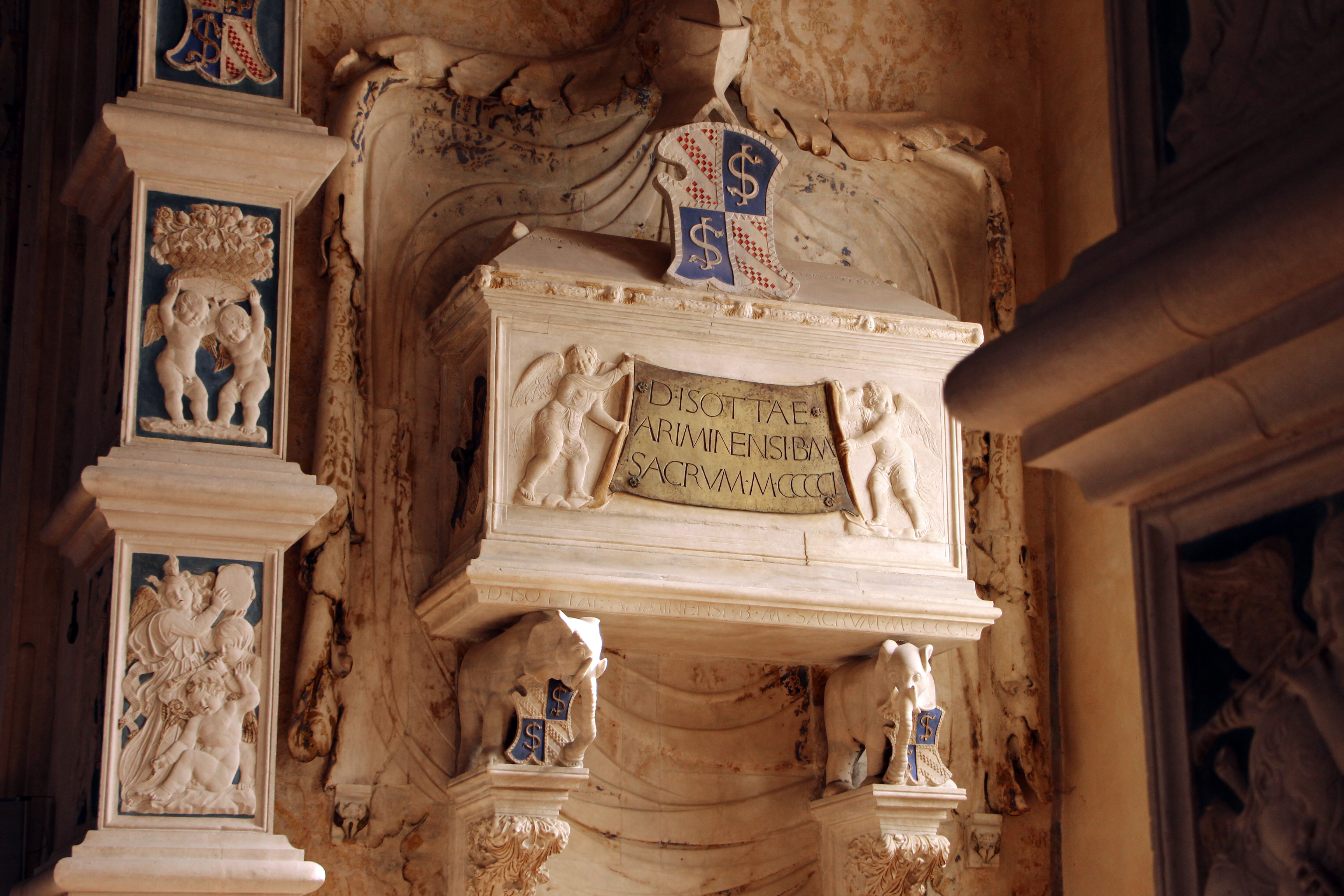 Tempio Malatestiano - MIBAC The making of this document was supported by Wikimedia CH. (Submit your project!) For all the files concerned, please see the category Supported by Wikimedia CH. This is a photo of a monument which is part of cultural heritage of Italy.